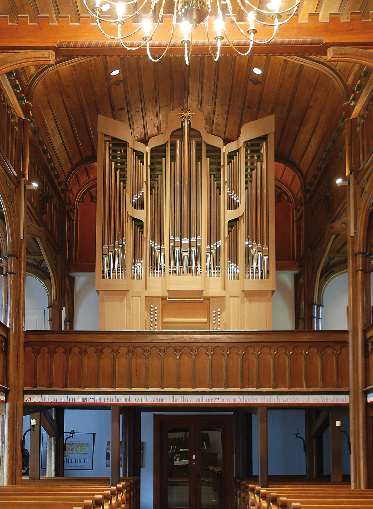 Orgel der Martin-Luther-Kirche Trittau, Schleswig-Holstein